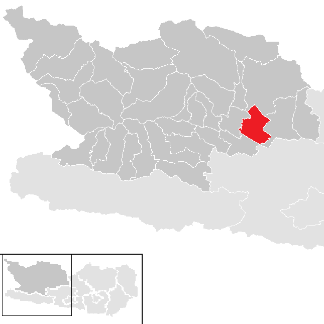 Bezirk Spittal an der Drau